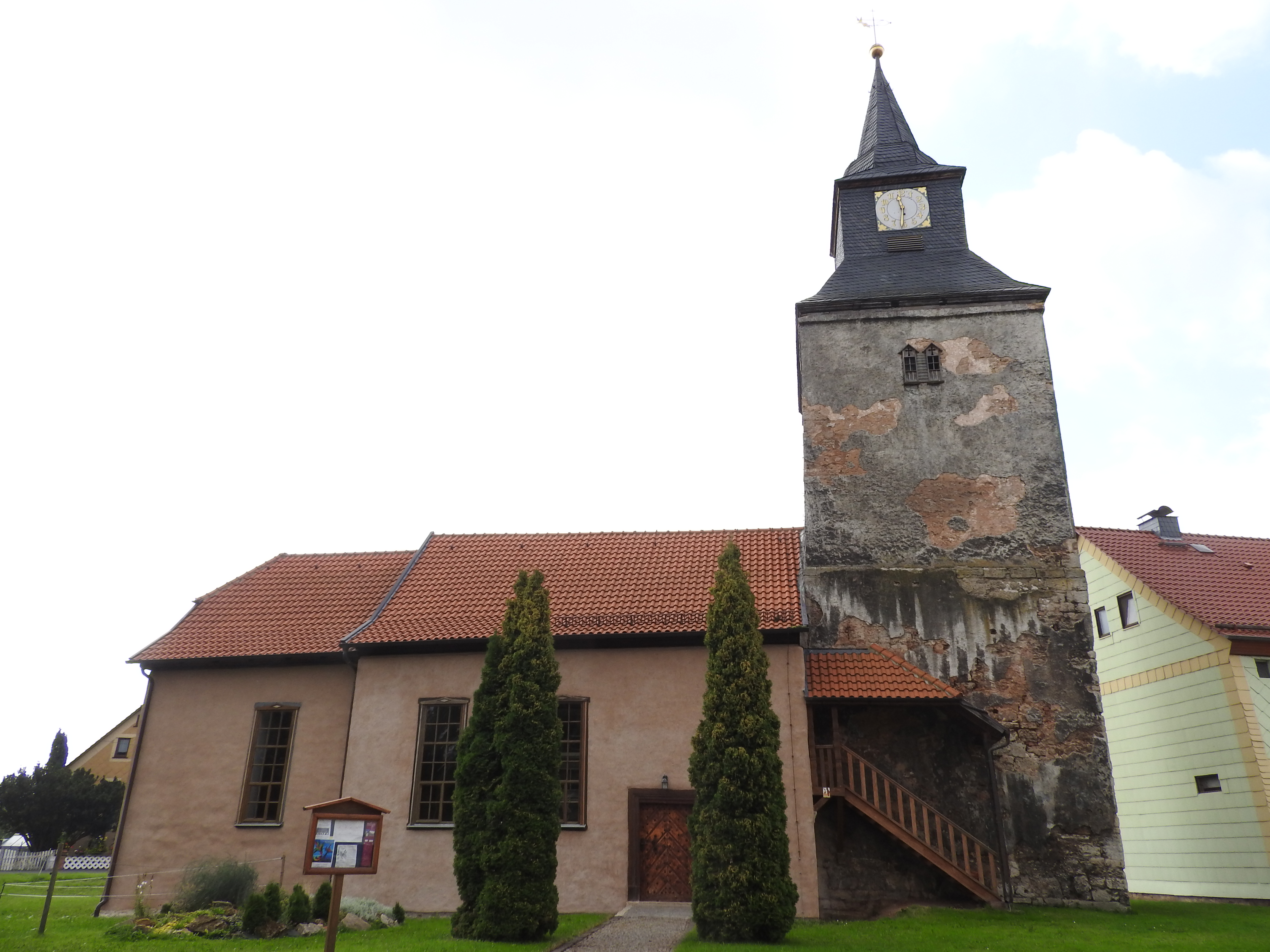 Evangelische Kirche in Kleinbodungen, Thüringen